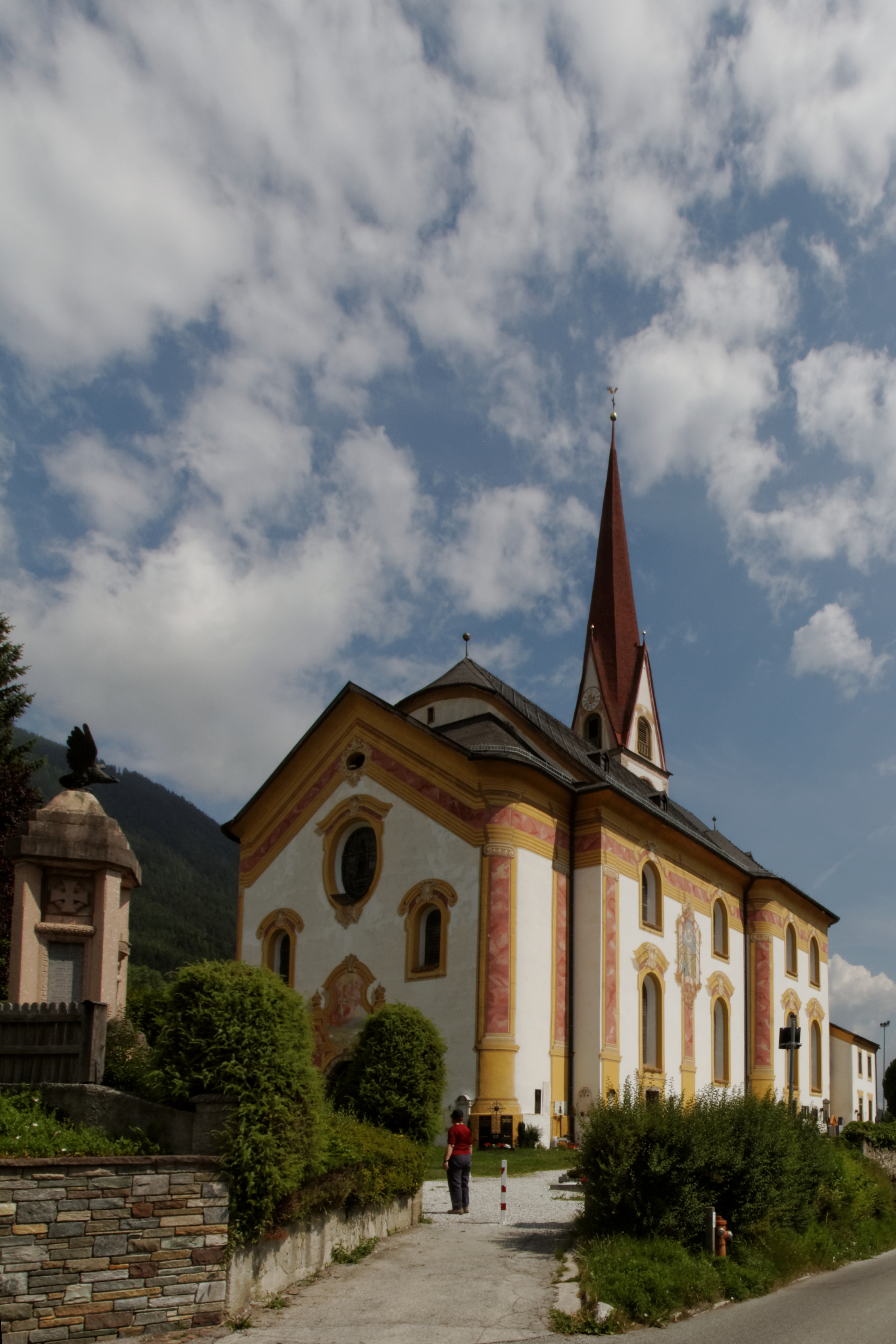 Pfarrkirche St. Pankratius, Telfes im Stubaital